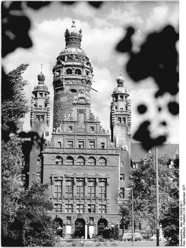 Leipzig, "Neues Rathaus" ADN-ZB Gahlbeck 24.9.77 Leipzig: Schöne DDR - Das Neue Rathaus von Leipzig.